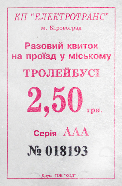 Тролейбусний квиток кіровоград 2016